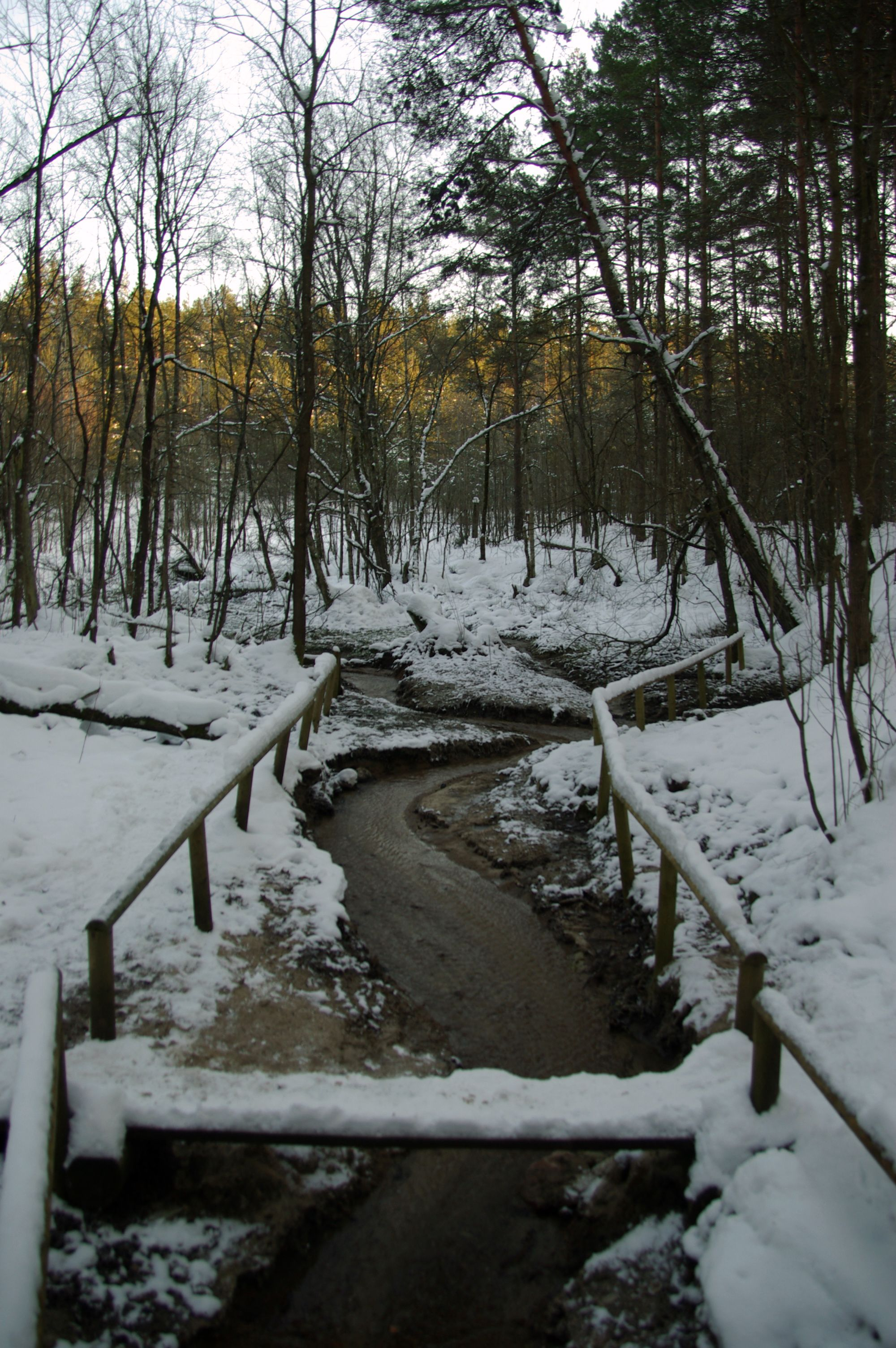 Aiataguse allikad on allikad Harju maakonnas Tallinnas Nõmme linnaosas Pääsküla raba idaosas